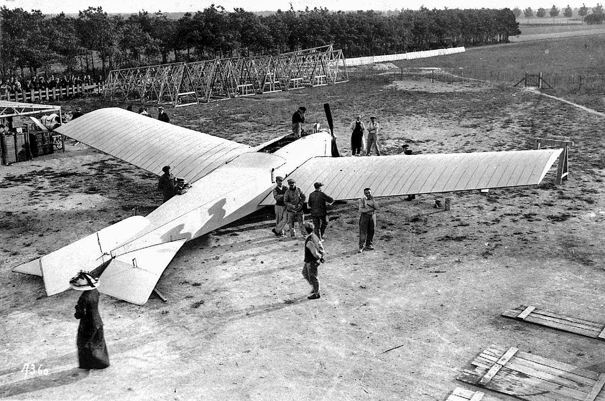 Francuski samolot rozpoznawczy Antoinette militaire.